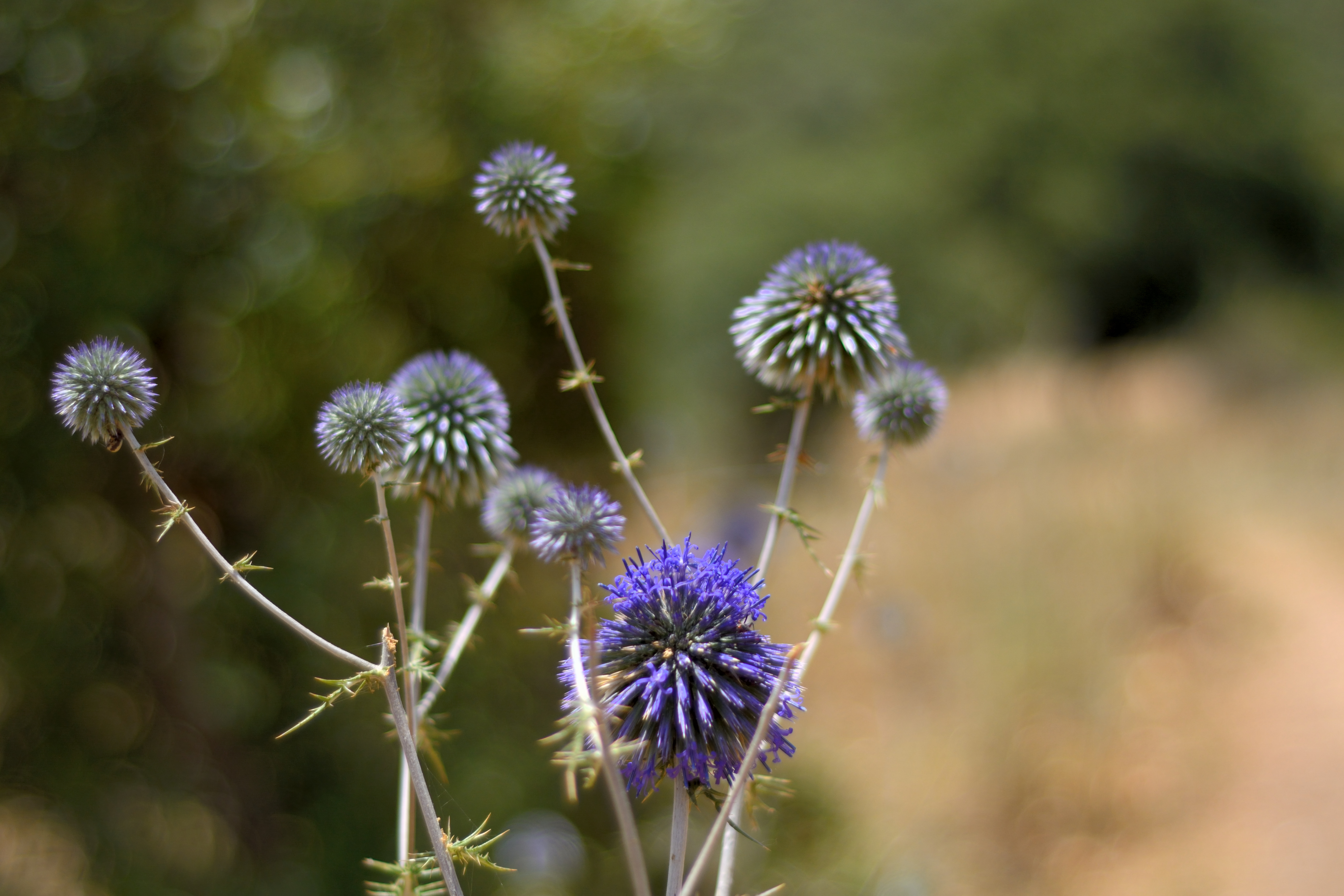 Мордовник обыкновенный на юге заповедника Алоним.